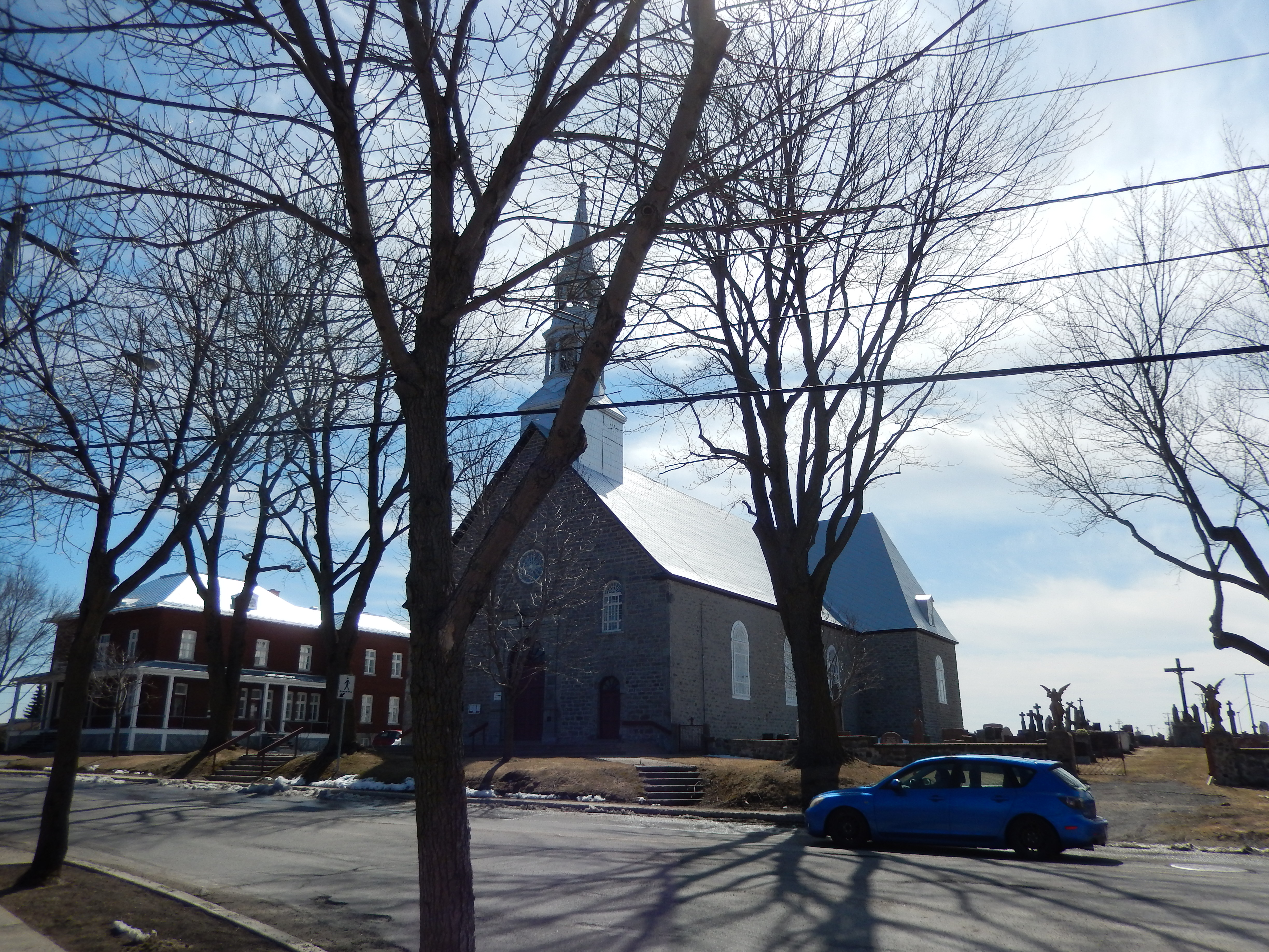 Église Saint-Paul, avril 2016.